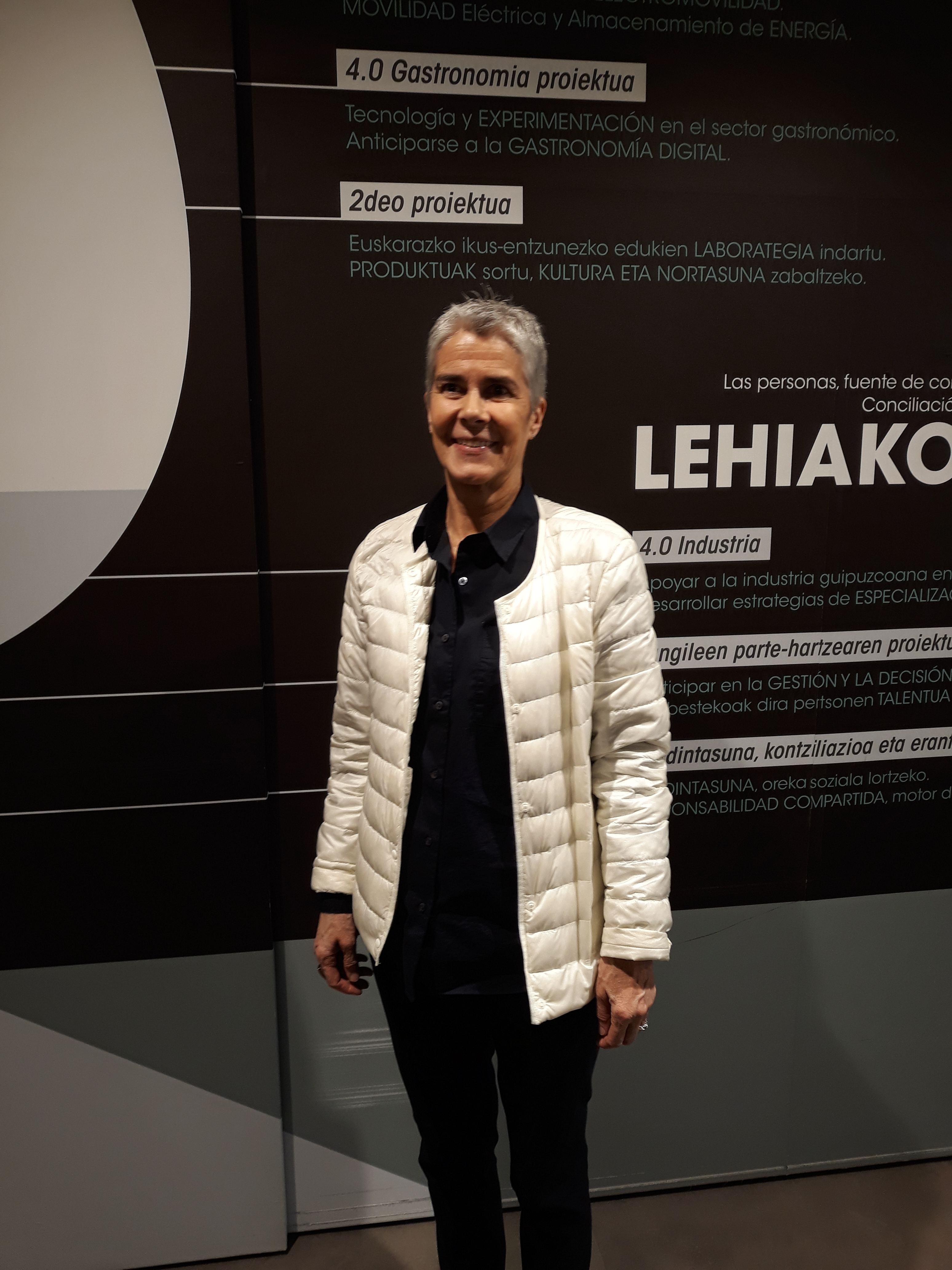 Basque politician. Esther Larrañaga